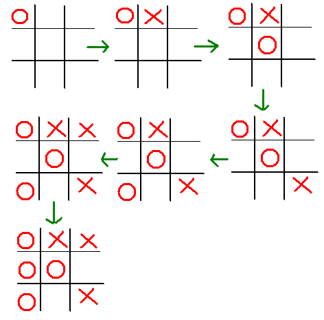 自製